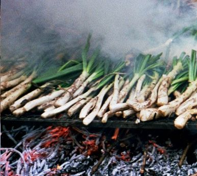 Calçots a la graella